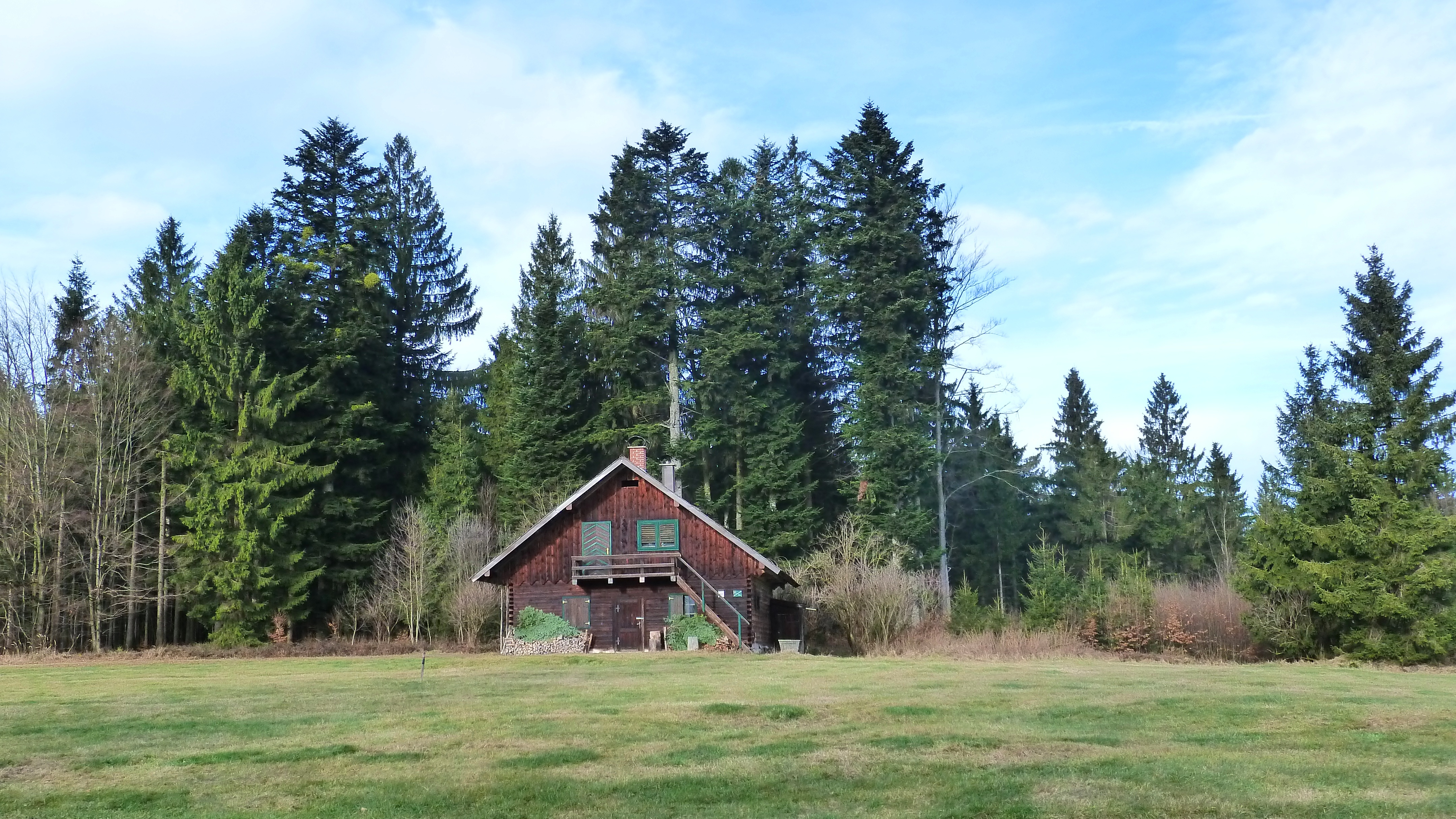 The "Kalteis" is a mountain in the Hausruck- and Kobernaußerwald. It is 734 meters high.